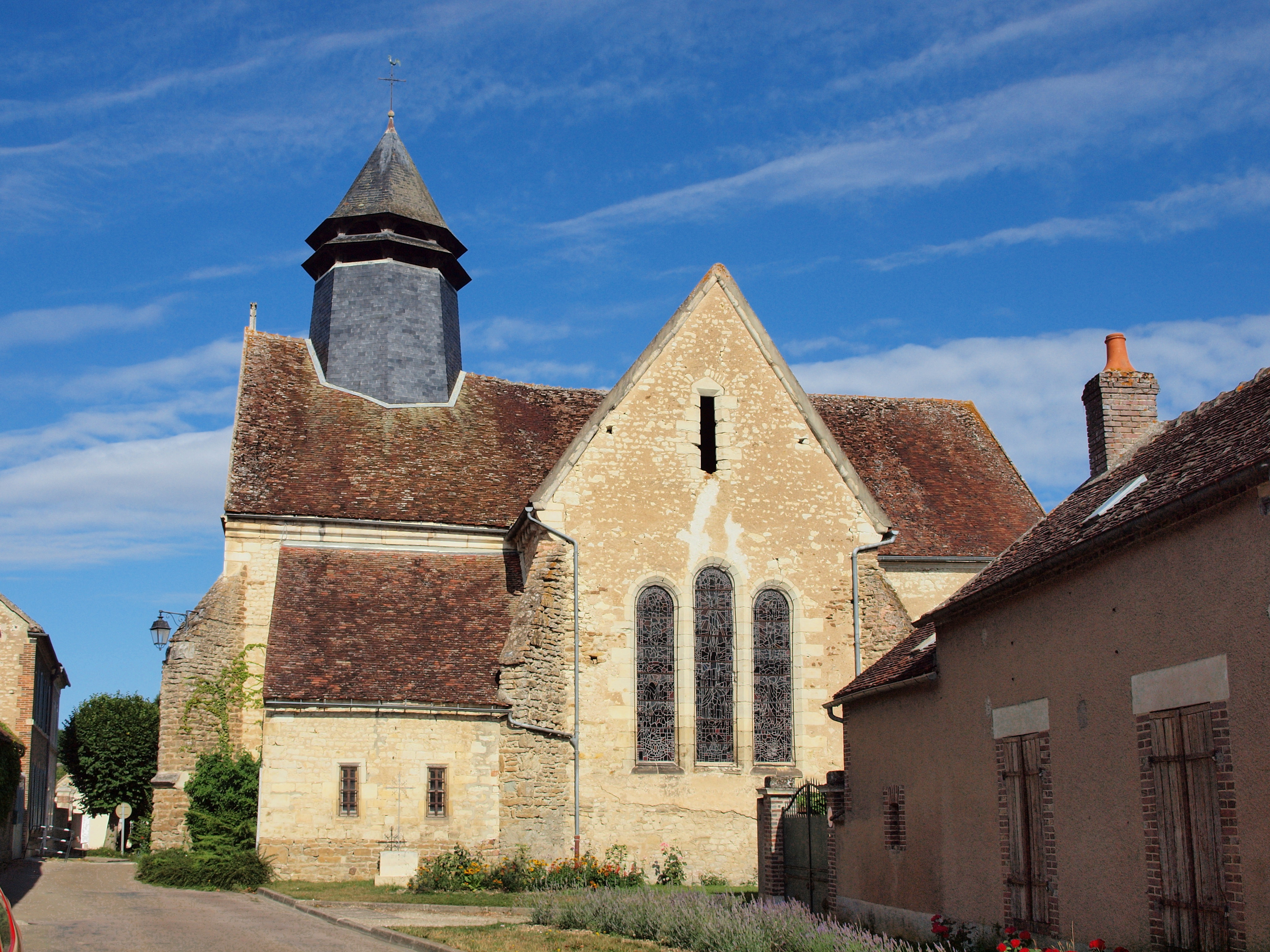 Église Saint-Laurent et Saint-Vincent de Chichery-la-Ville (Yonne, France)